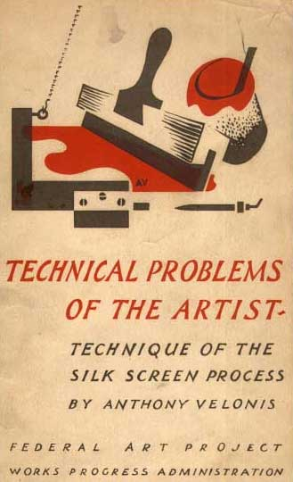 Technische Anleitung Velonis